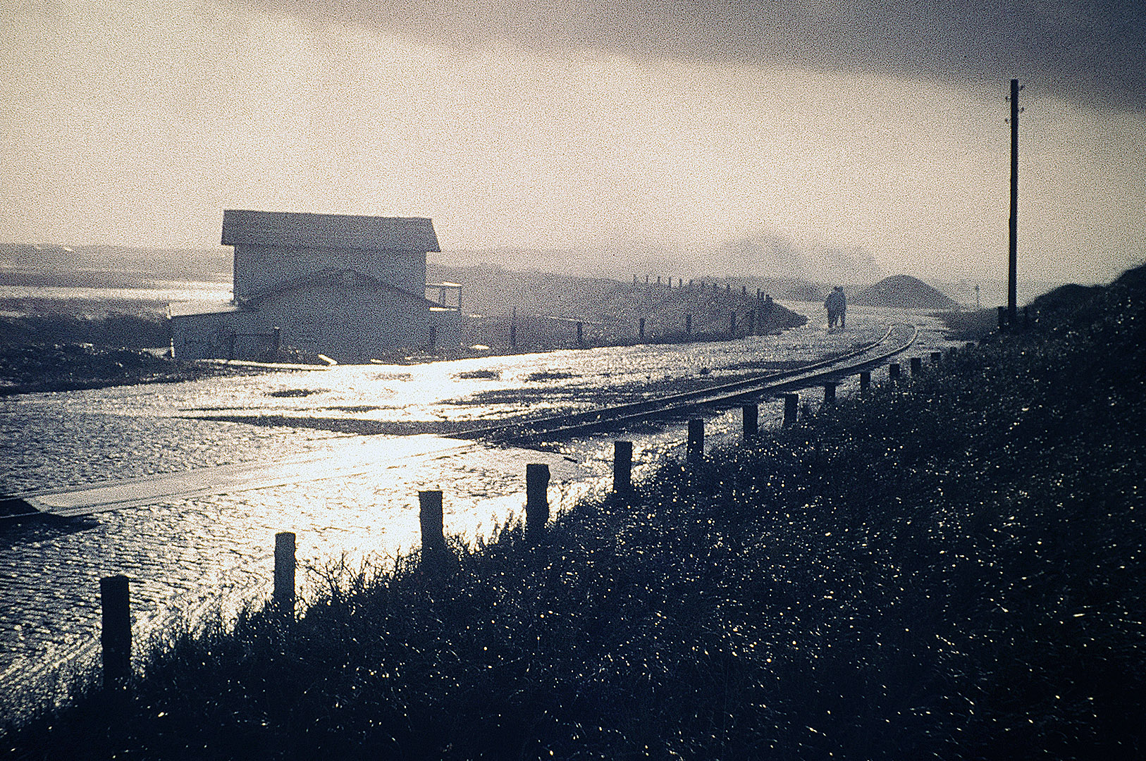 Sturmflut auf Spiekeroog im Jahr 1973 im Bereich Café Westend/Laramie. Die Schienen der Inselbahn führten damals noch bis zum alten Anleger für die Schiffe. Der ortsnahe Hafen wurde erst im Sommer 1981 in Betrieb genommen.